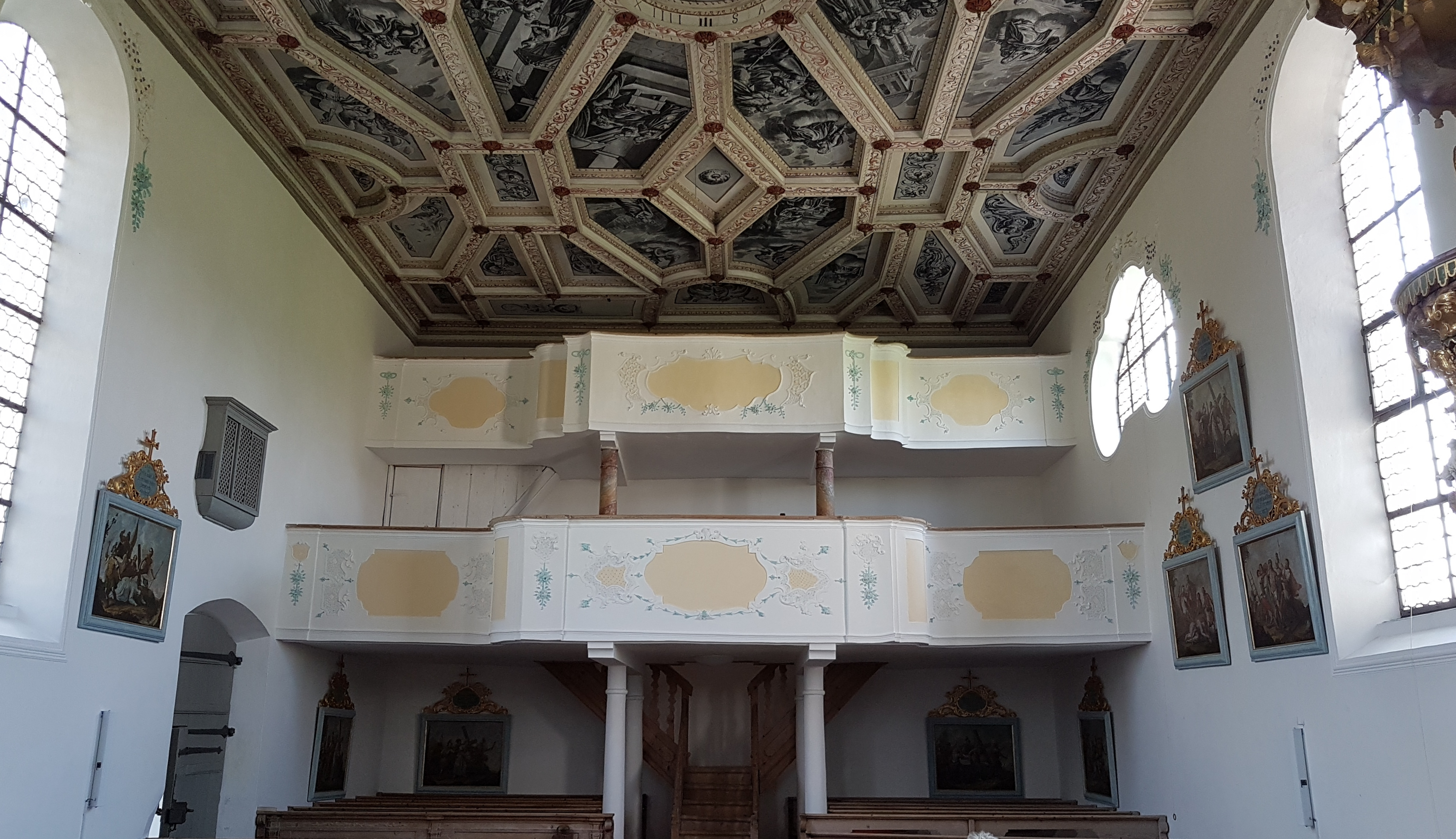 Burggen, ehemalige Wallfahrtskirche St. Anna